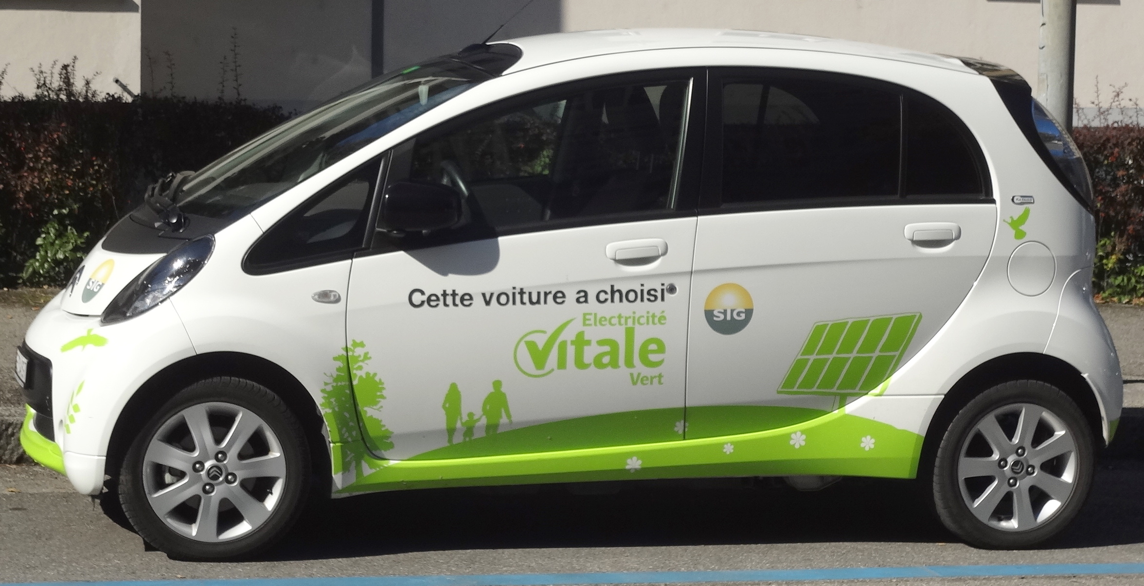 Véhicule électrique des Services industriels de Genève, marque Citroën, à Onex.